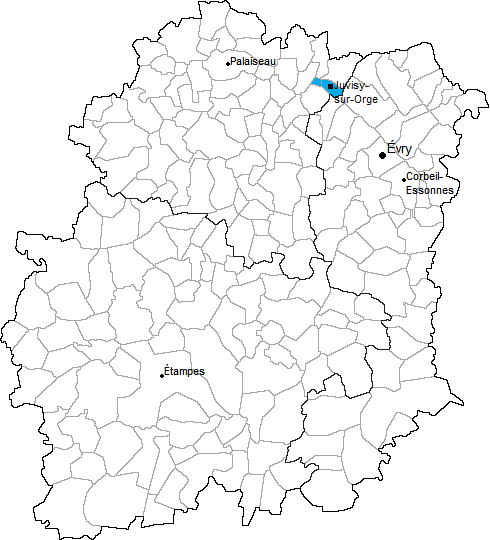 Carte de localisation du canton de Juvisy-sur-Orge en Essonne (91)